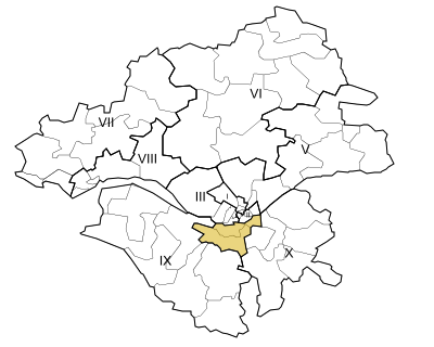 Carte de la quatrième circonscription de la Loire-Atlantique